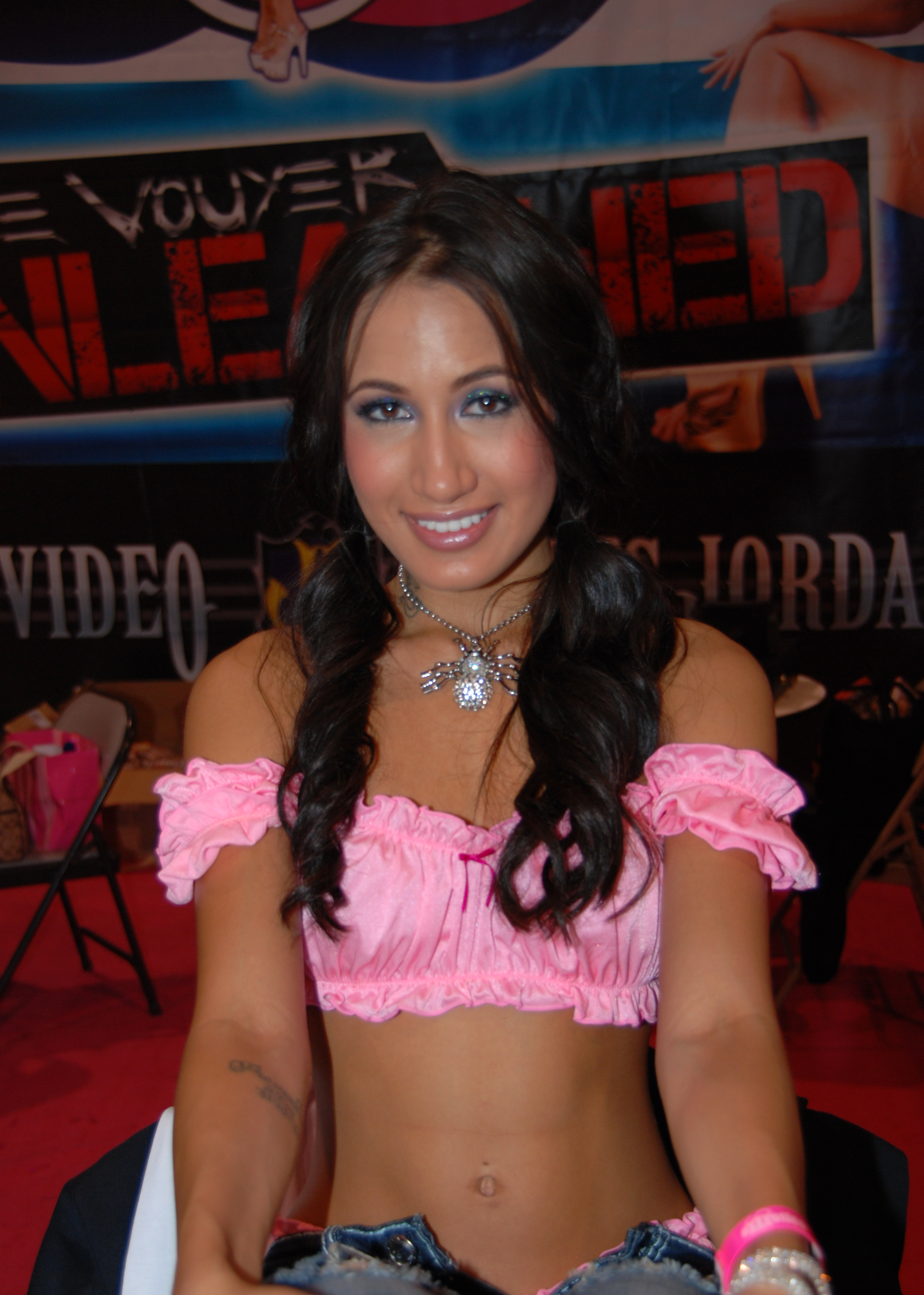 Amia Miley